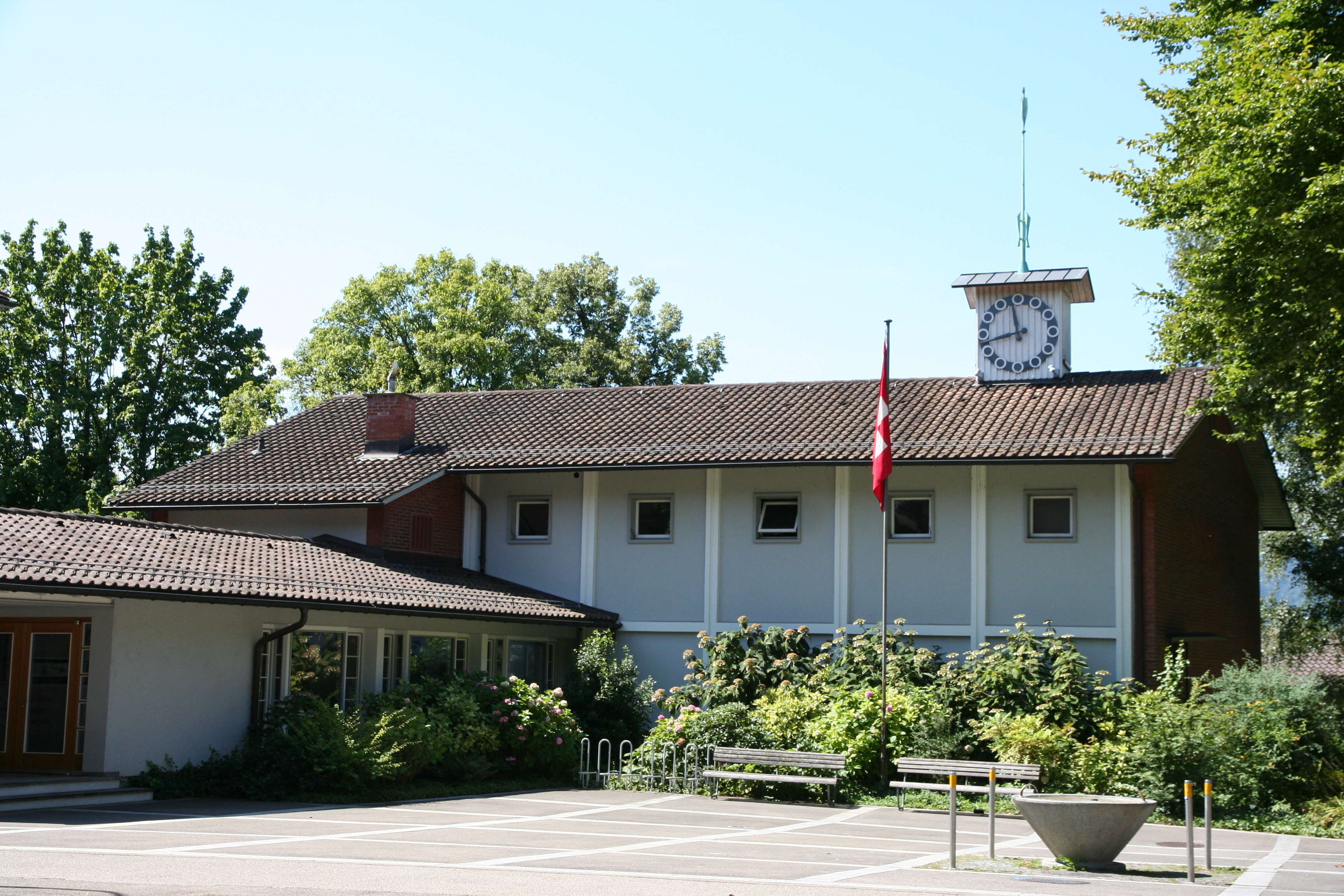 Evangelisch-reformierte Kirche Letten in Zürich-Wipkingen